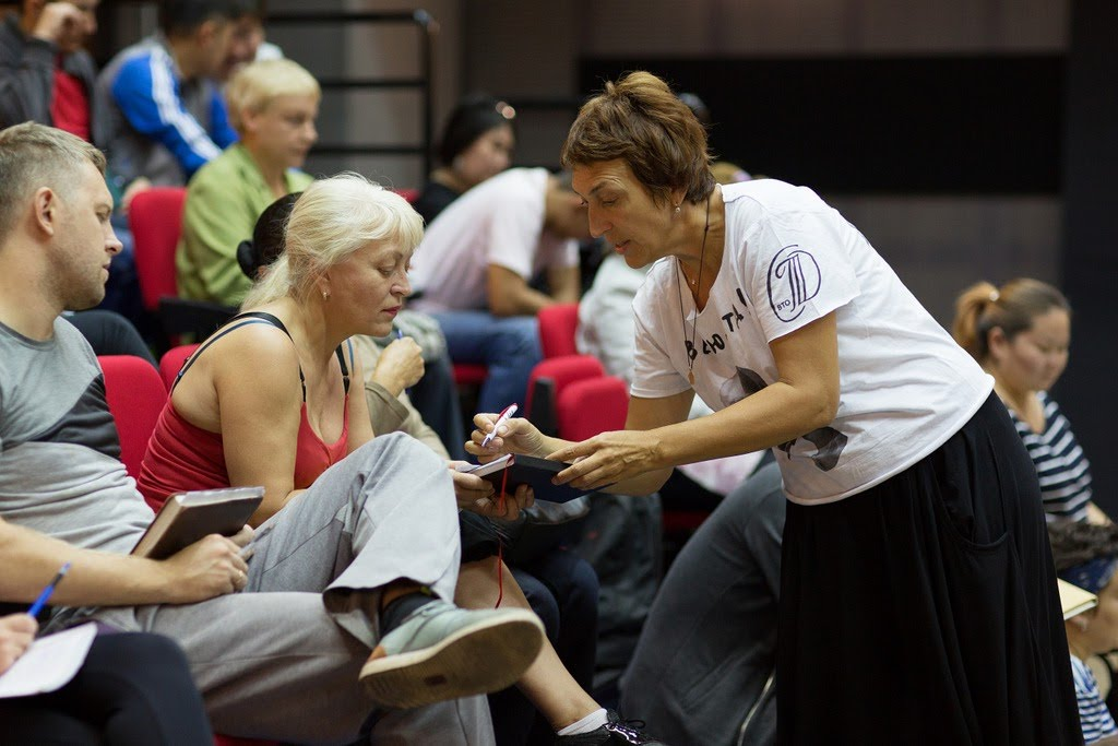 22 августа 2017, Союз театральных деятелей Республики Бурятия, семинар-практикум по сценической речи, сценическому движению и фехтованию для актеров профессиональных театров города Улан-Удэ. На Фото Елена Валентиновна Ласкавая мастер по сценичесой речи.